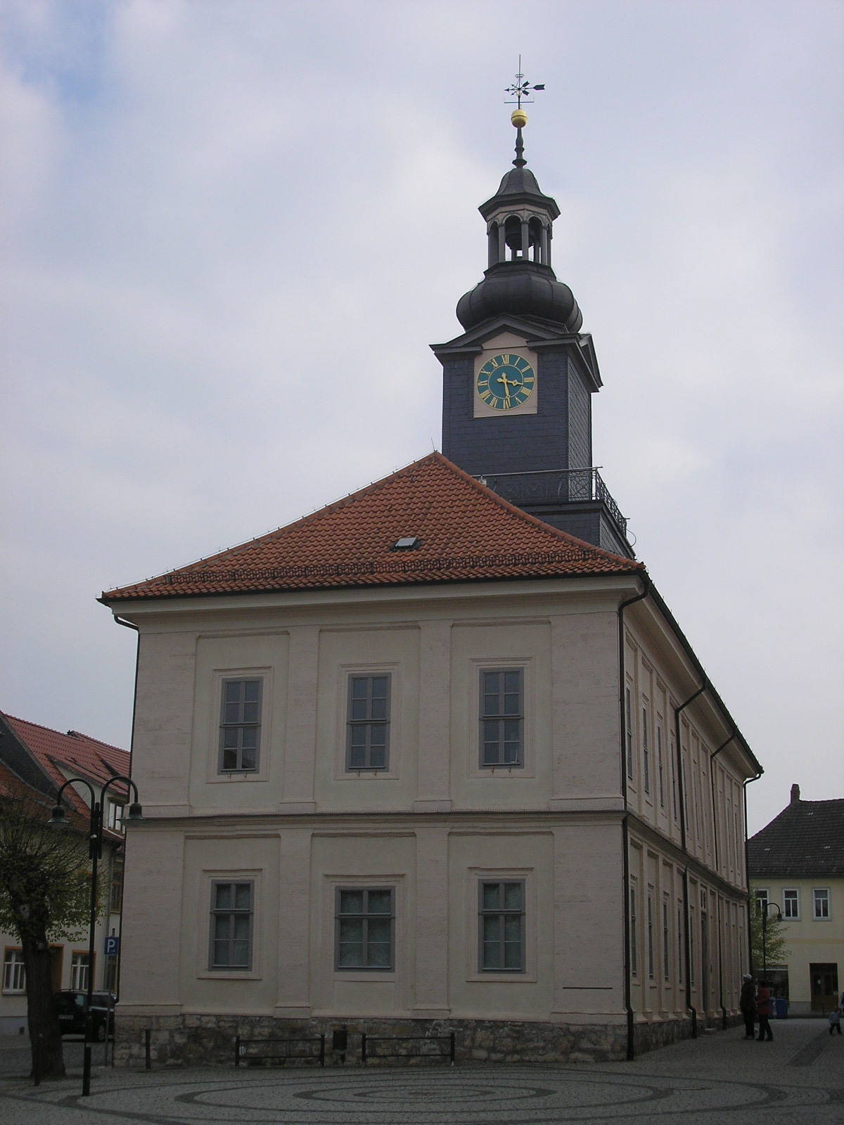 Das Rathaus von Greußen (Thüringen).